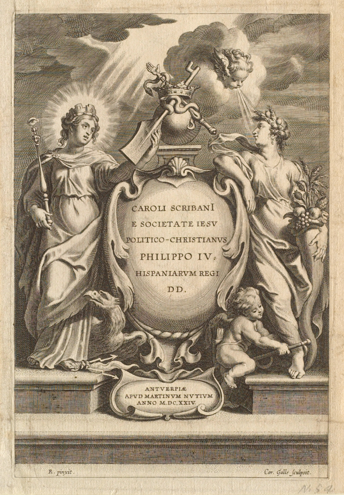 Cornelis Galle según Peter Paul Rubens: Frontispicio de Caroli Scribani, Politico-Christianus Philippo IV Hispaniarum Regis DD., Amberes, Martin Nucio, 1624